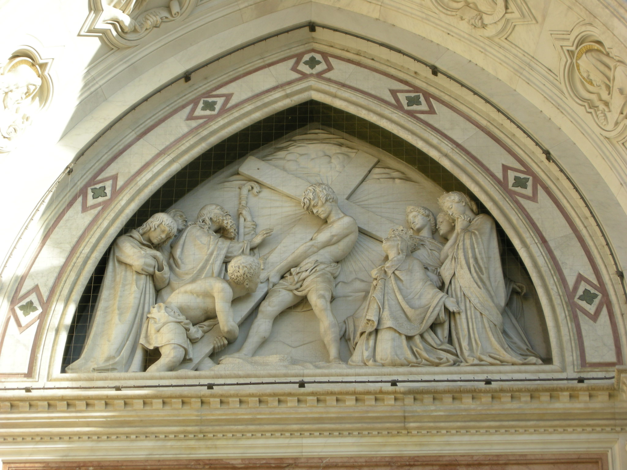 Facciata di santa croce, 01 invenzione della croce di titto sarrocchi